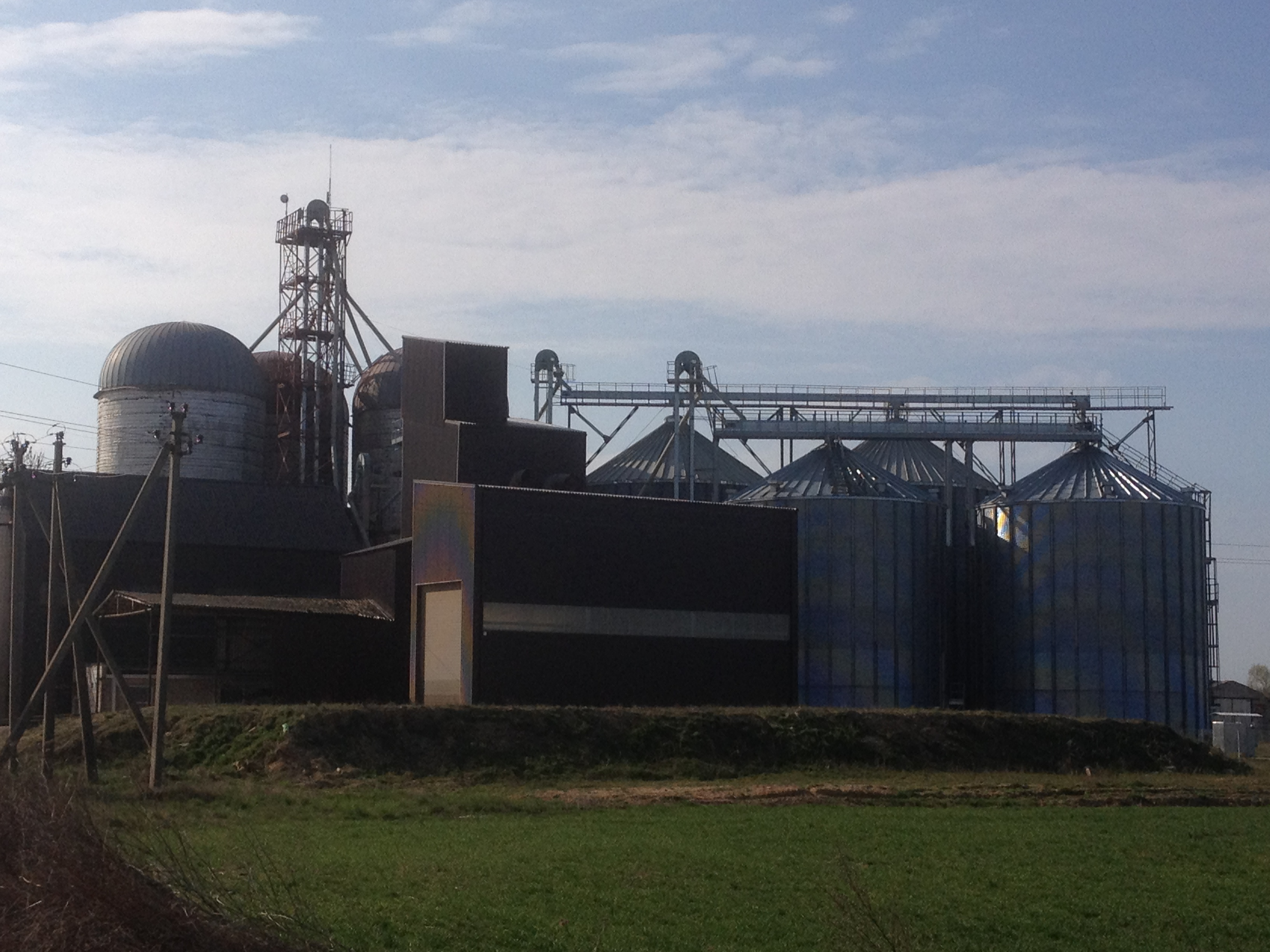 Ručiūnų elevatorius